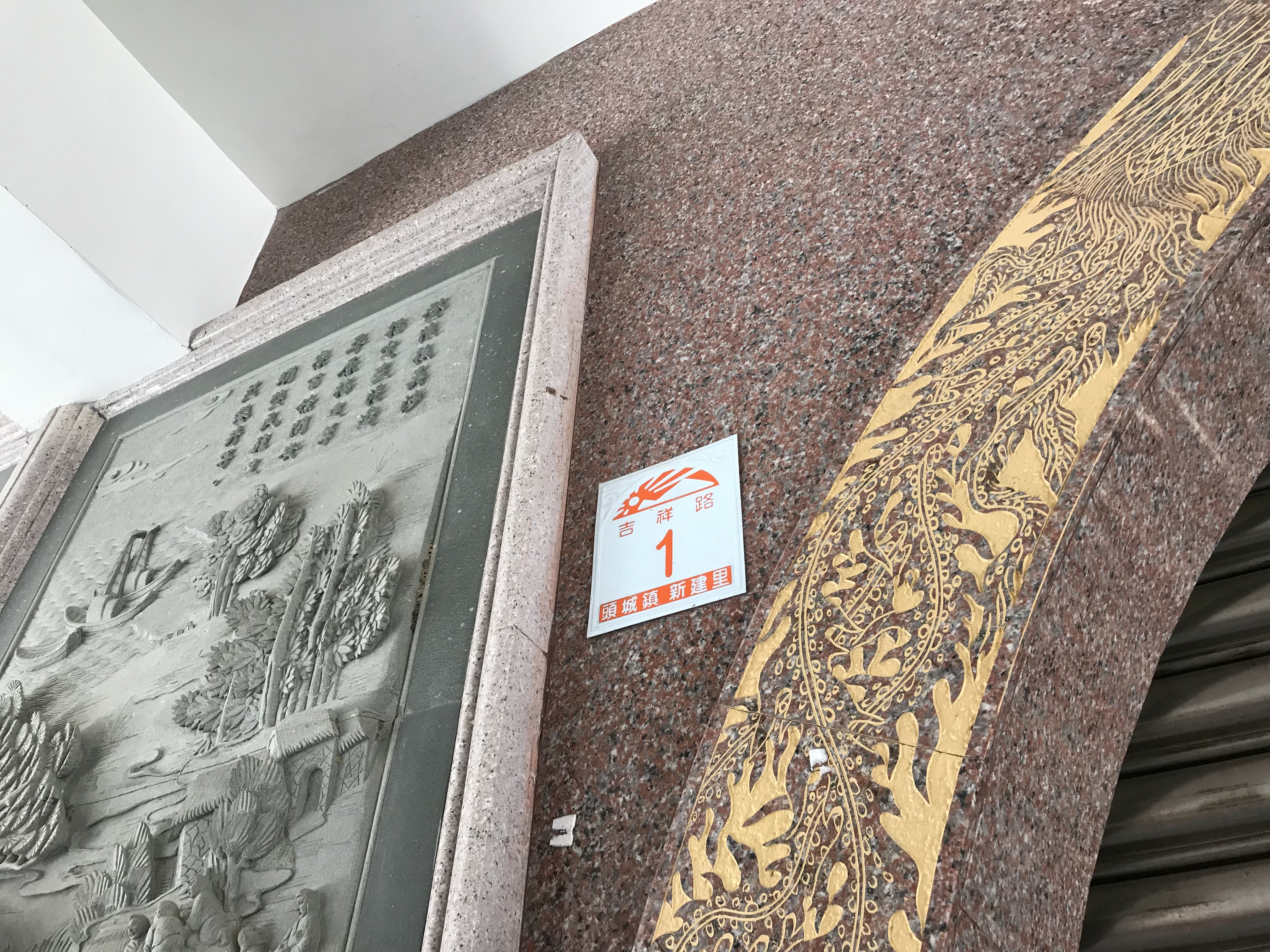 頭城開成寺城隍廟門牌